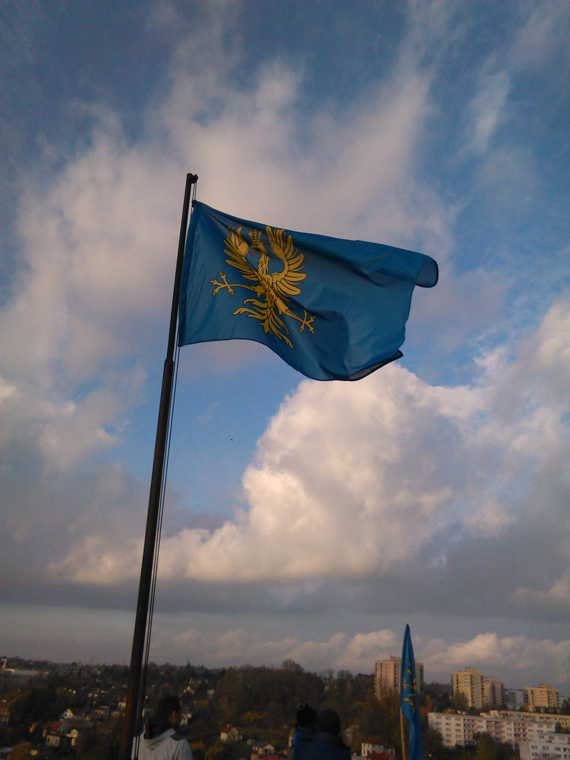 Flaga Księstwa Cieszyńskiego na Wieży Piastowskiej w Cieszynie